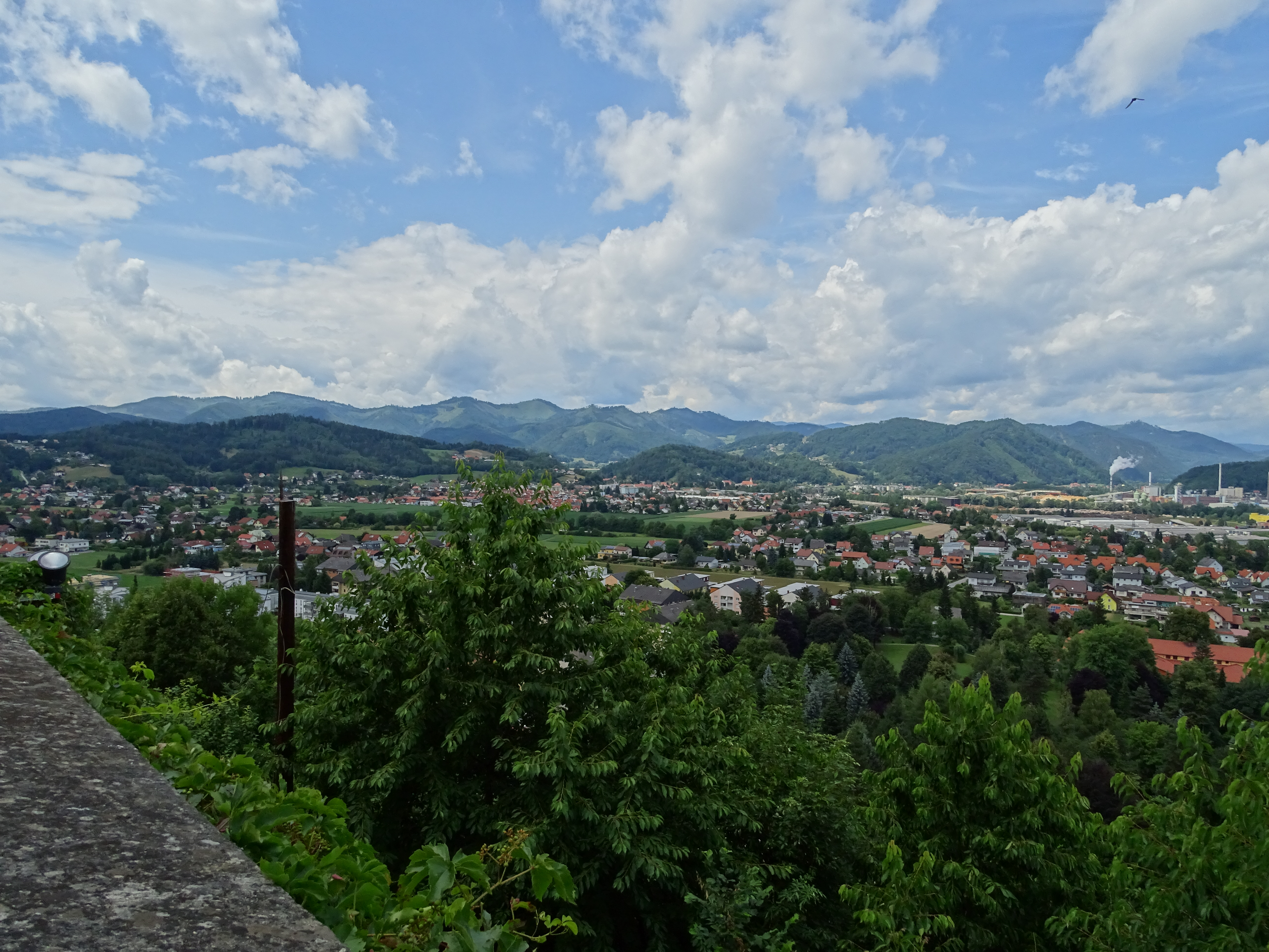 Blick von der Wallfahrtskirche Maria Straßengel auf die Ortsteile Judendorf-Straßengel und Gratwein der Gemeinde Gratwein-Straßengel. In der Mitte rechts erkennt man die Pfarrkirche Gratwein und die rauchenden Schornsteine gehören zur Papierfabrik SAPPI, welche bereits auf dem Gemeindegebiet von Gratkorn liegt. Der Ortsteil Eisbach befindet sich hinter den Hügeln im Vordergrund. Gratwein-Straßengel